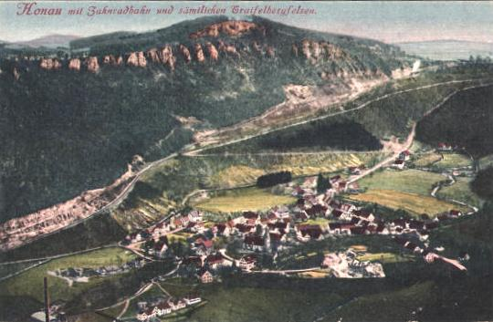 Zahnradbahn Honau-Lichtenstein - Postcard 1905